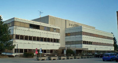 Aussenansicht des Gospel Life Center